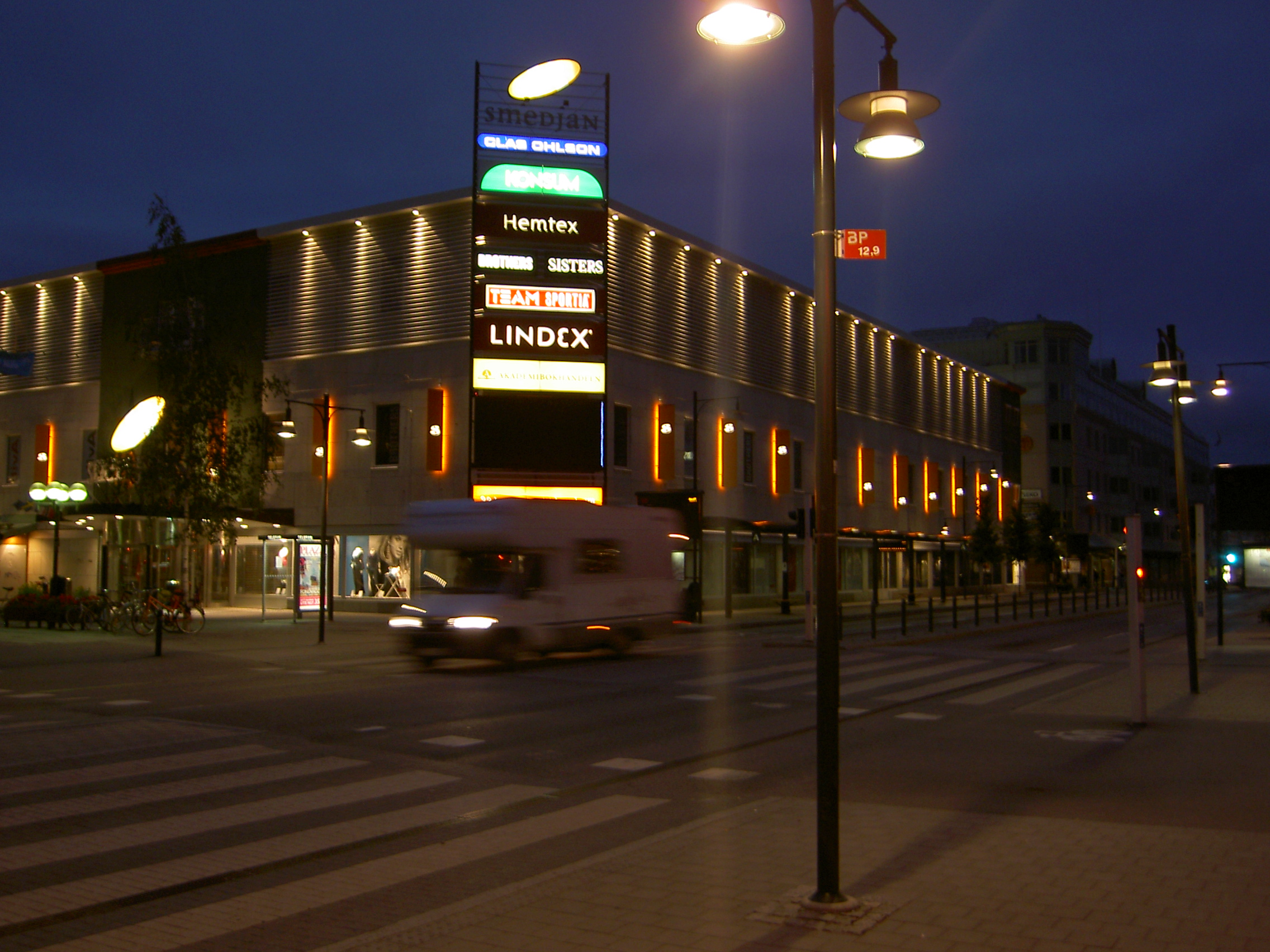 Gallerian 'Smedjan' i Luleå.